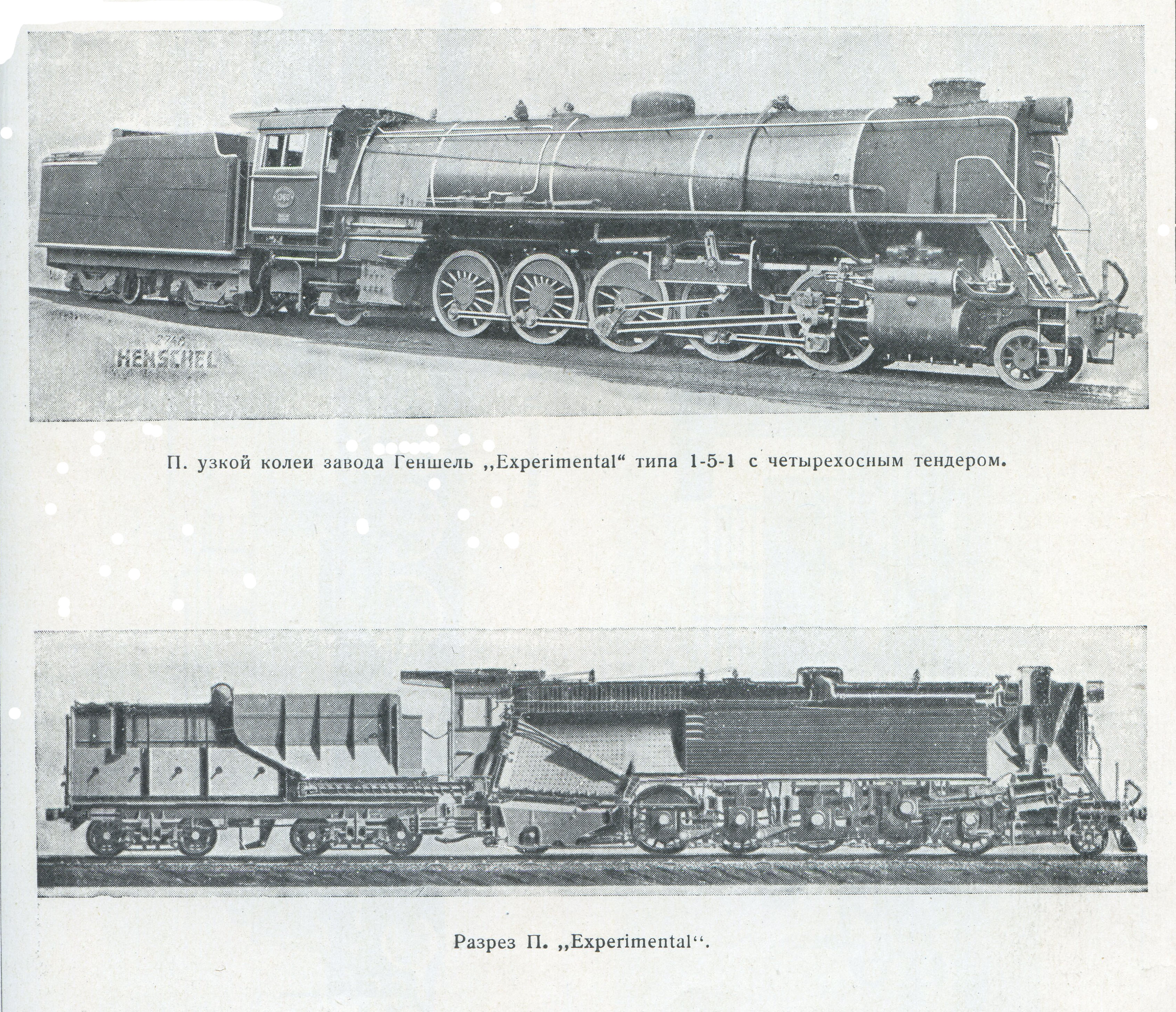 Паровозы Германии